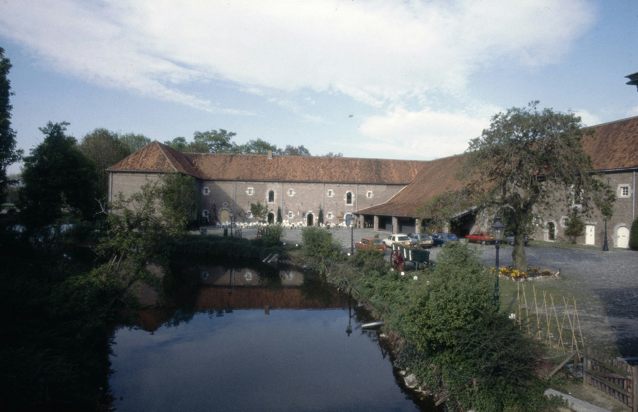 Kasteel: Exterieur OVERZICHT